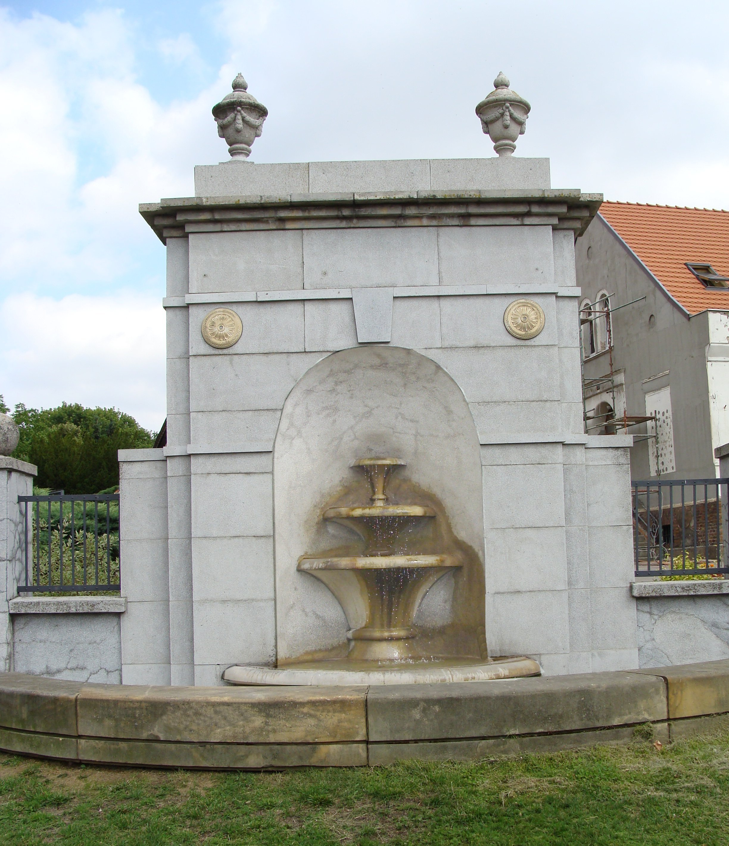 Fontanna obok rezydencji biskupiej, Gniezno